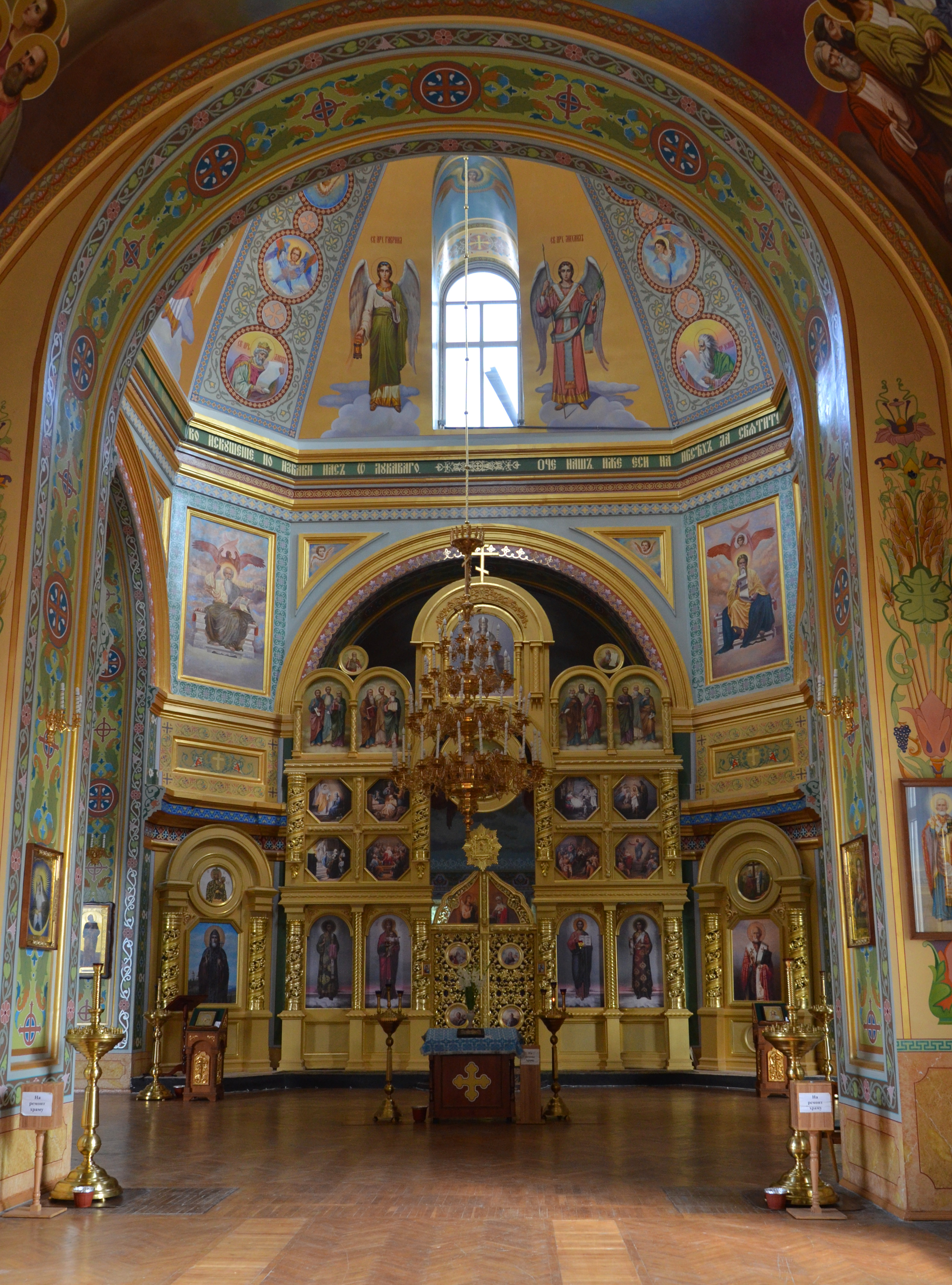 Хрестовоздвиженська Церква, Житомир, вул. Кафедральна, 18